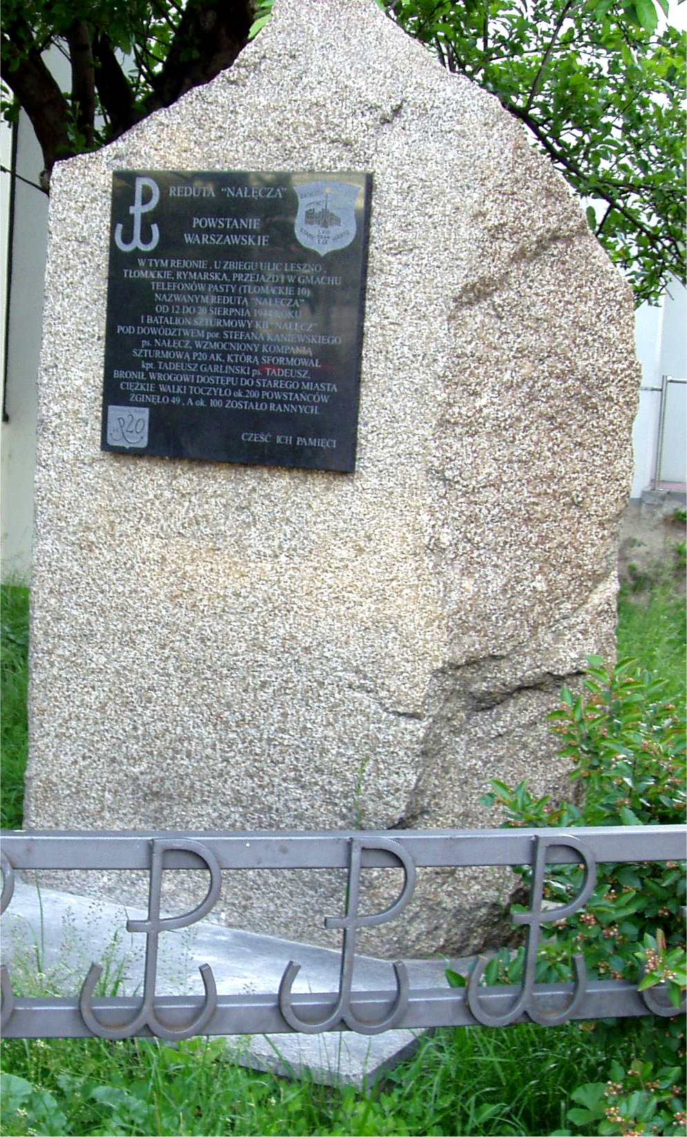 Reduta Nałęcza - Miejsce pamięci w okolicy Arsenału w Warszawie